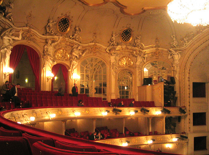 Berlin, Germany: Komische Oper Berlin Location: Berlin-Mitte, Behrenstraße